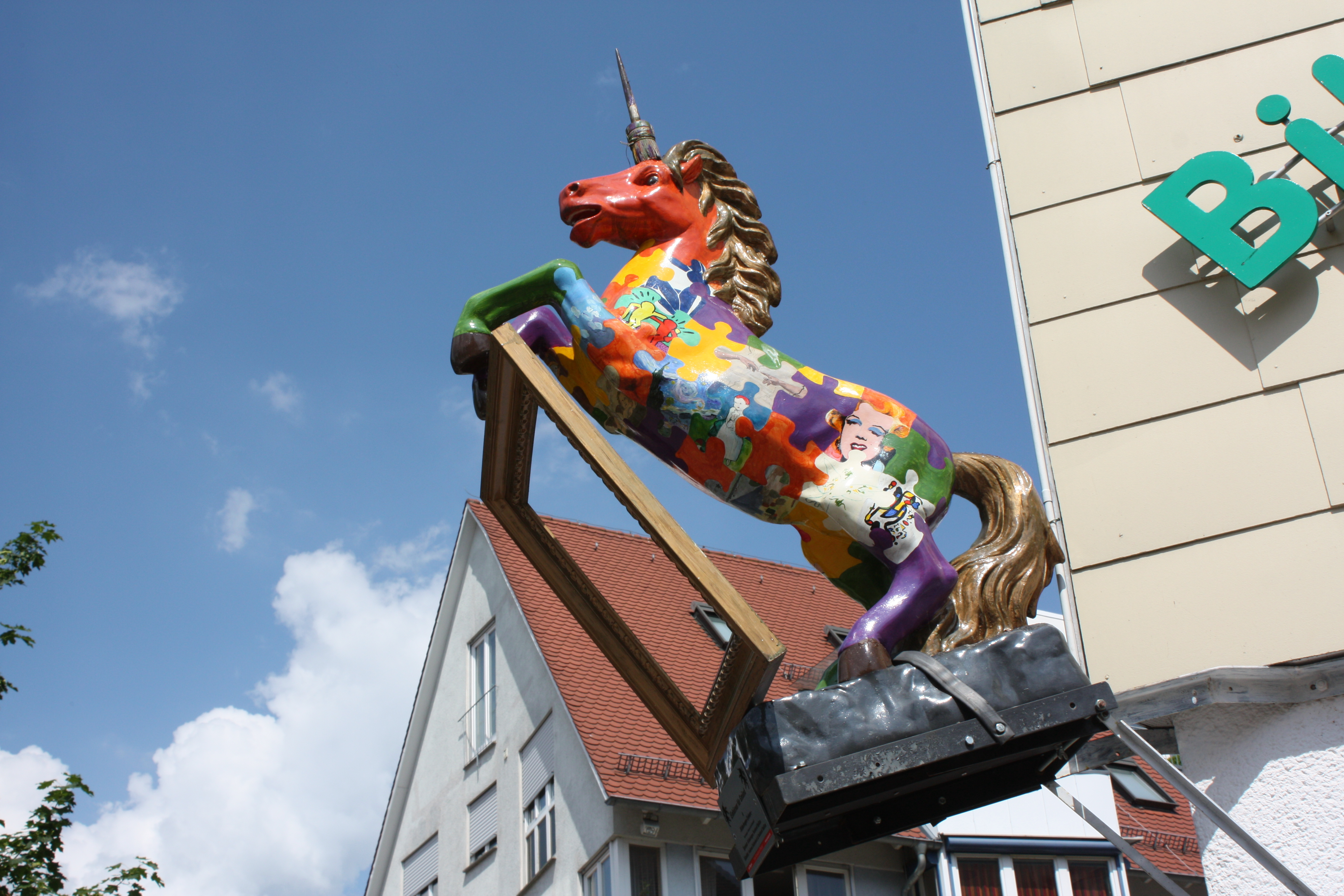 Das Gmünder Wappentier, das Einhorn, als Skulptur an einer Häuserfassade in Schwäbisch Gmünd